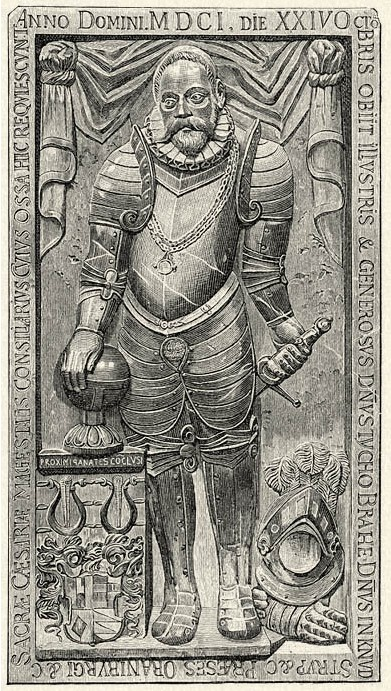 Náhrobek Tycha de Brahe